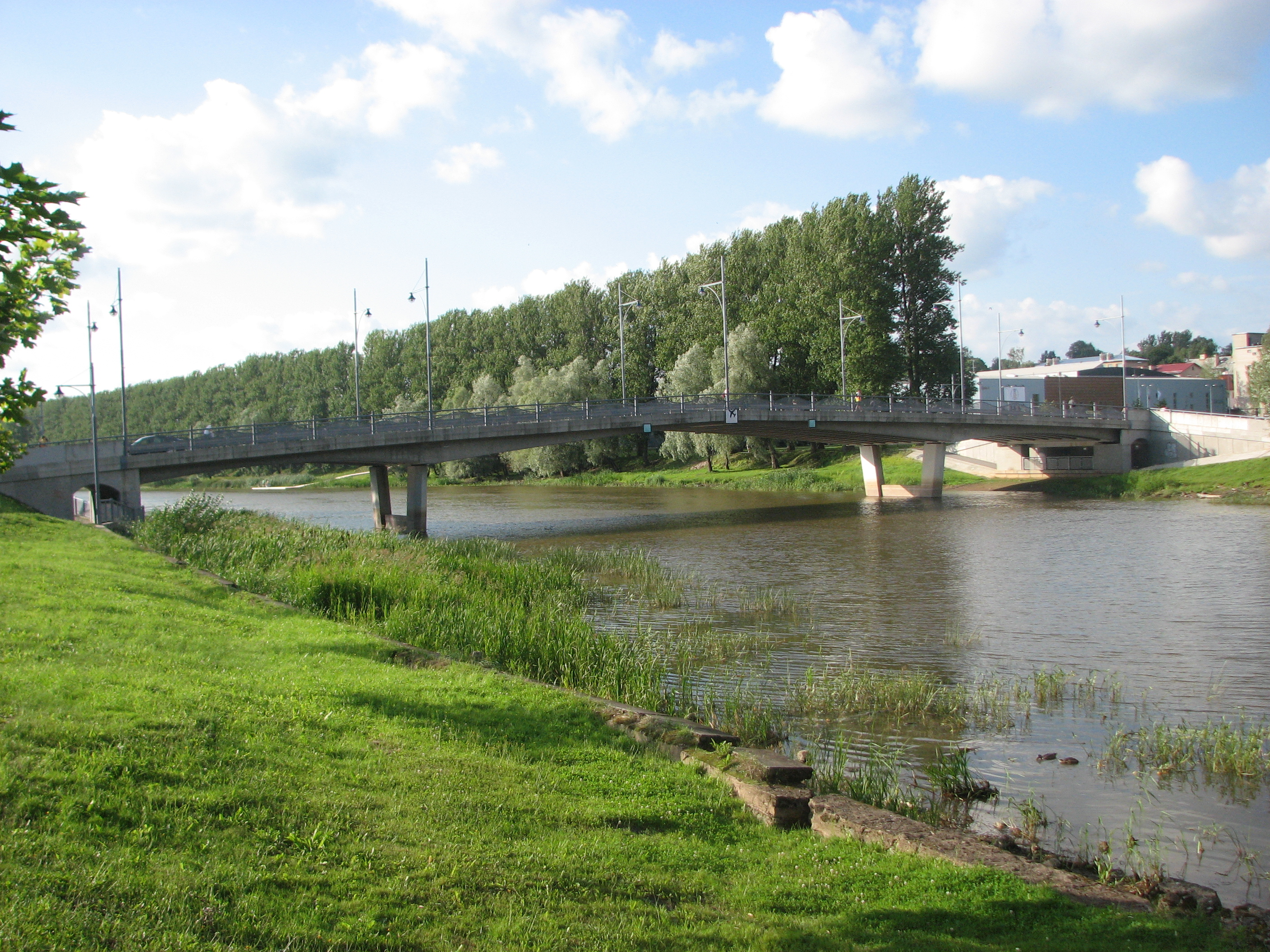 Kroonuaia bridge in Tartu, Estonia